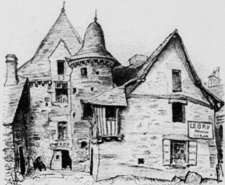 Montfort-sur-Meu ; vieilles maisons (lithographie d'Albert Robida publiée dans "La vieille France, Bretagne" vers 1900)